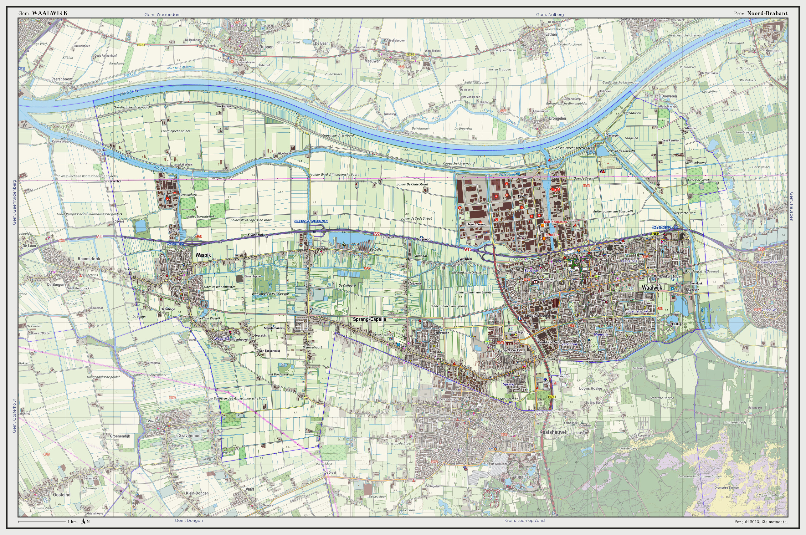 Topografische kaart van gemeente Waalwijk (2013). Samengesteld door Jan-Willem van Aalst op basis van de GML open geodata van de BRT/Top10NL (basisregistratie Topografie, Kadaster 2011), vrijgegeven door Kadaster onder de Creative Commons BY licentie. Additionele gegevens uit BAG (8 juli 2013), uit de Open Street Map (9 juli 2013) en uit de Risicokaart. Peildatum kaartbeeld: 9 juli 2013. Zie ook Gemeentenatlas.nl Samenstelling en kleurenschema: Jan-Willem van Aalst, met QuantumGIS en Photoshop. Zie ook de Legenda.